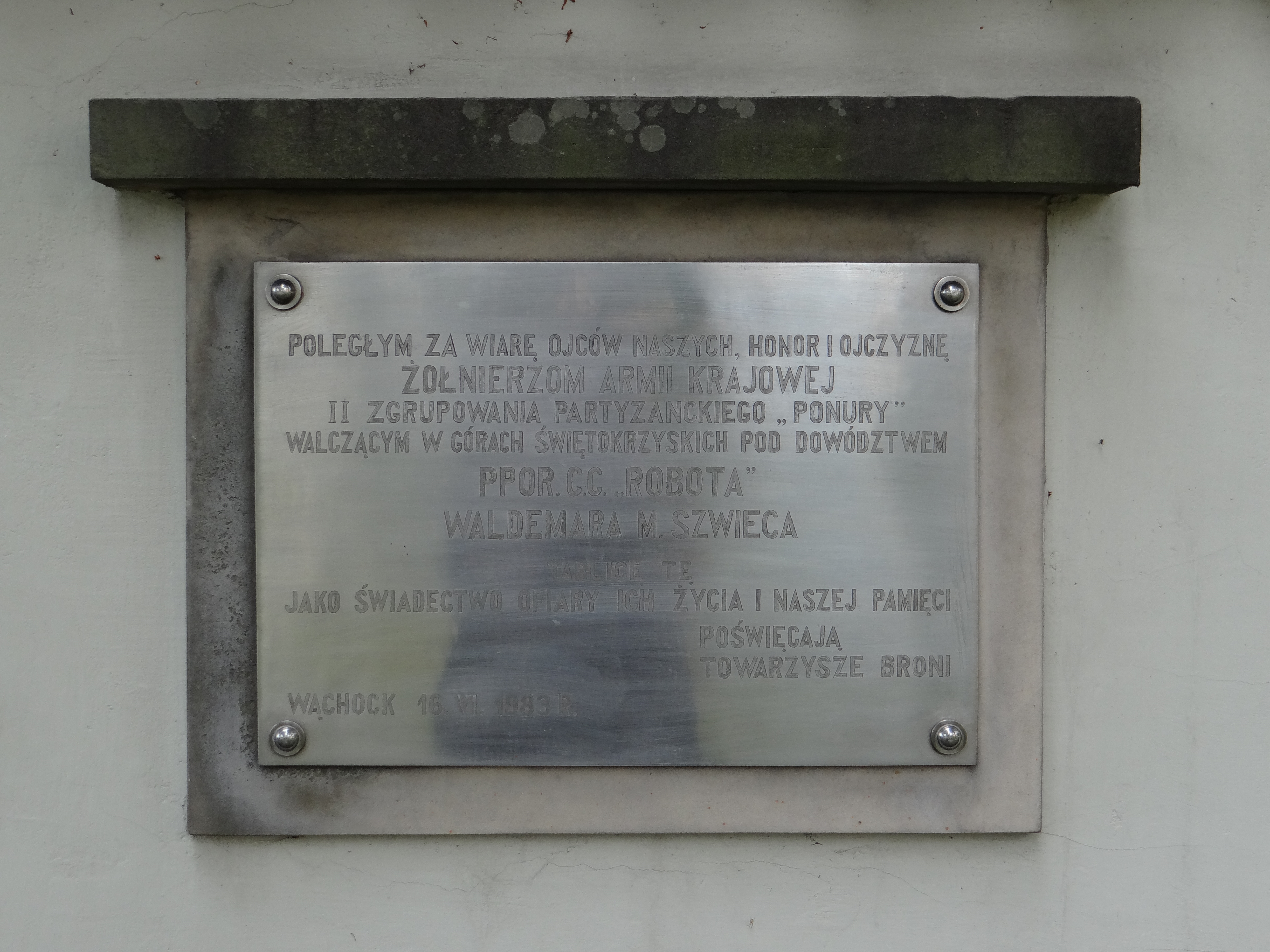 Klasztor Cystersów w Wąchocku - tablica upamiętniająca ppor. Waldemara M. Szwieca "Robot", dowódcę II Zgrupowania Partyzanckiego Armii Krajowej działającego na terenach Gór Świętokrzyskich oraz jego podkomendnych